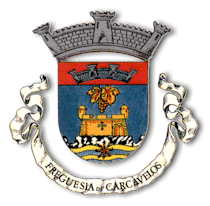 Heraldica da Freguesia de Carcavelos; Fonte